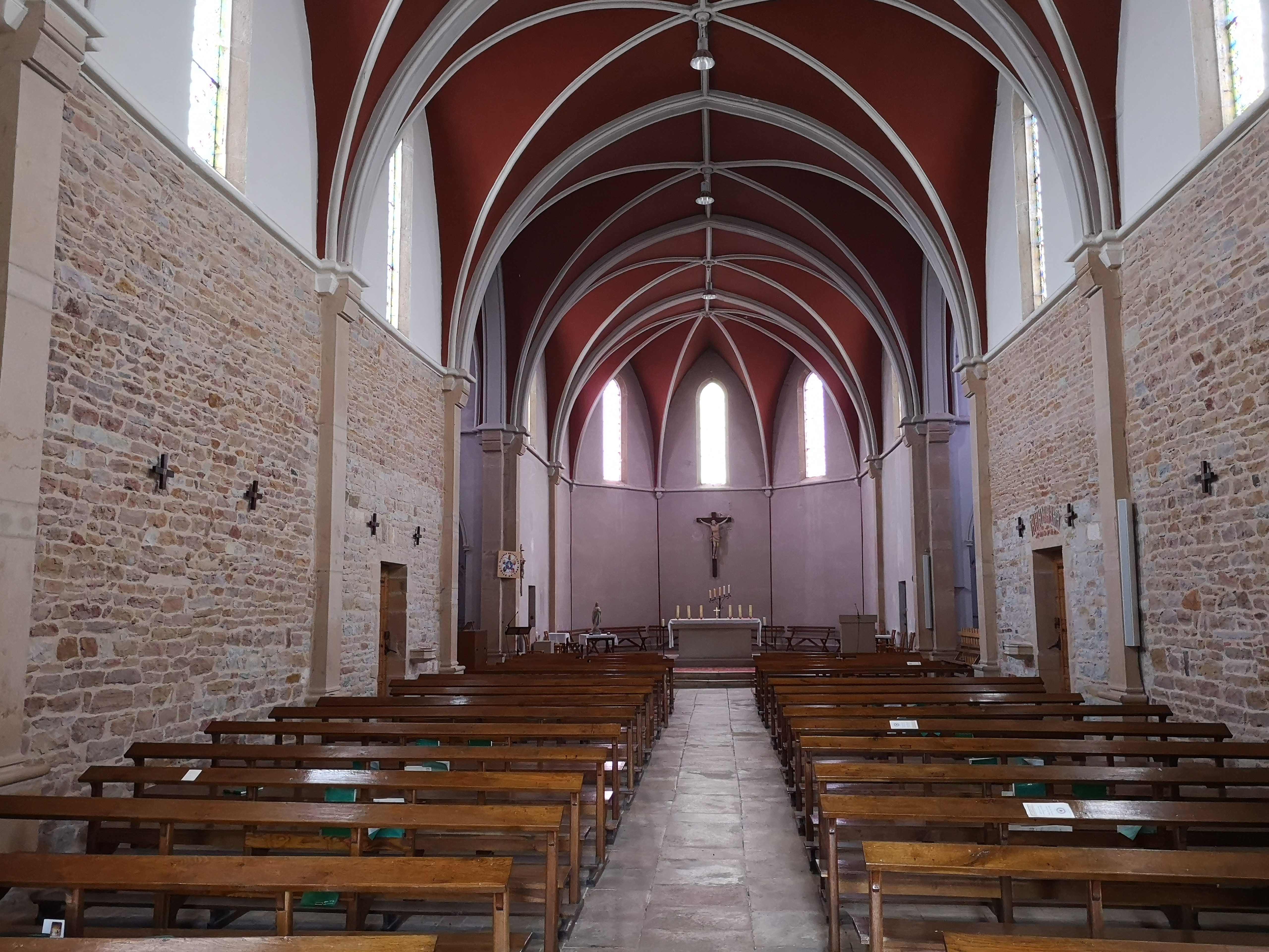 Intérieur de l'église Saint-Cyr de Saint-Cyr-sur-Menthon.